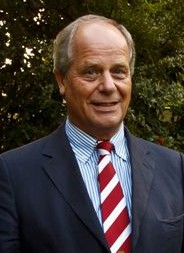 Prof. Johannes (Hans) van Oort